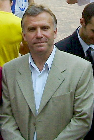 Ukrainian politician Stanislav Nikolaenko on May 29, 2005